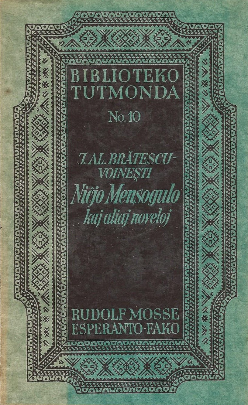 Niĉjo Mensogulo kaj aliaj noveloj